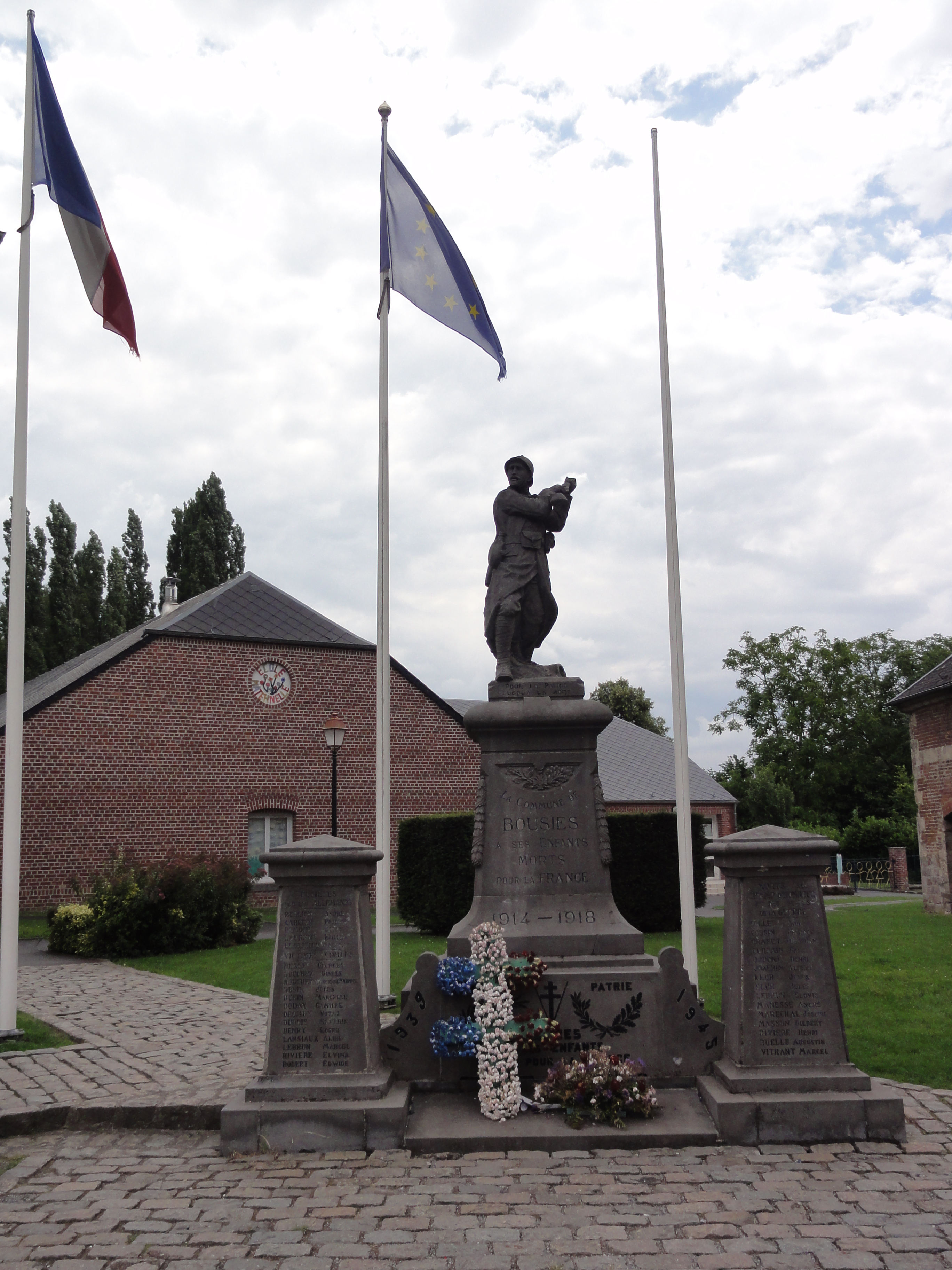 Bousies (Nord, Fr) monument aux morts